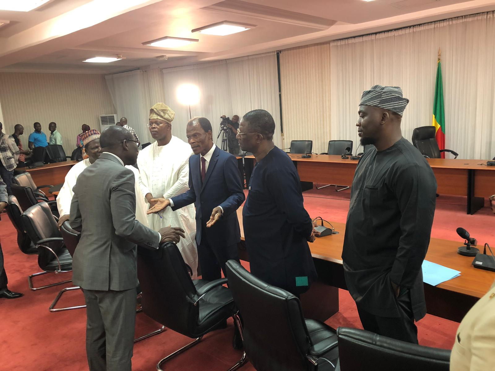 Patrice Talon salue les représentants de l'opposition après la rencontre, Benin, le 25 fevrier 2019. (VOA/Ginette Fleure Adandé)